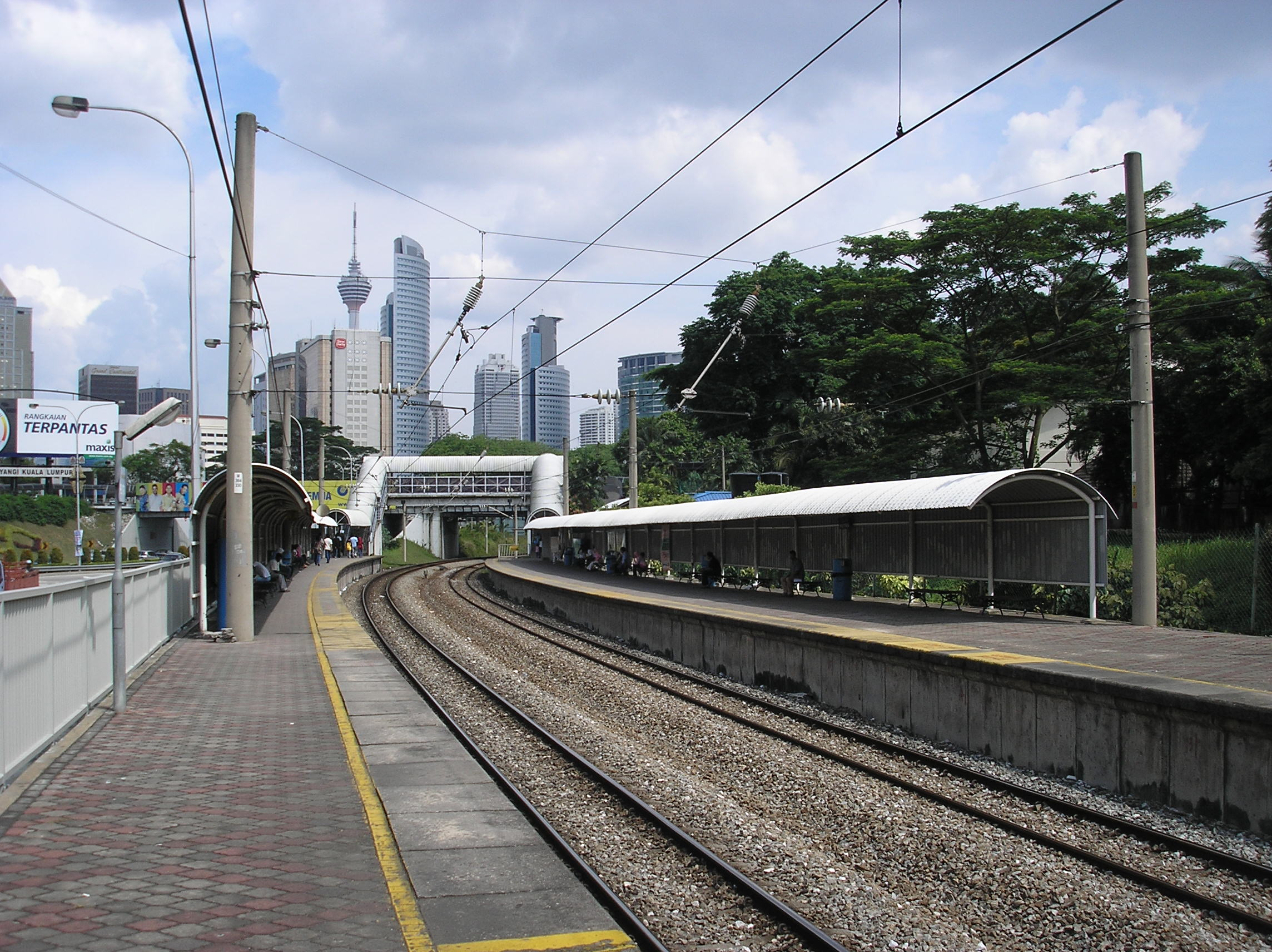 The Putra station (Rawang-Seremban/Sentul-Port Klang), Kuala Lumpur, Malaysia.